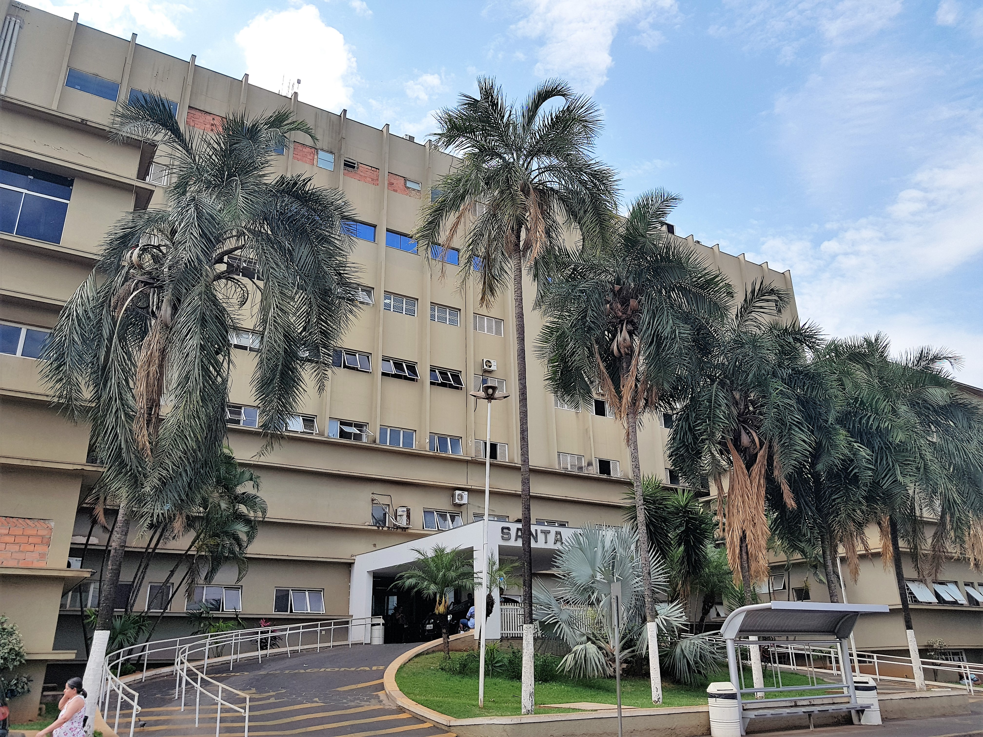 Vista frontal da Santa Casa de Misericórdia de Barretos. Detalhes em reformas do 1o e 6o andares